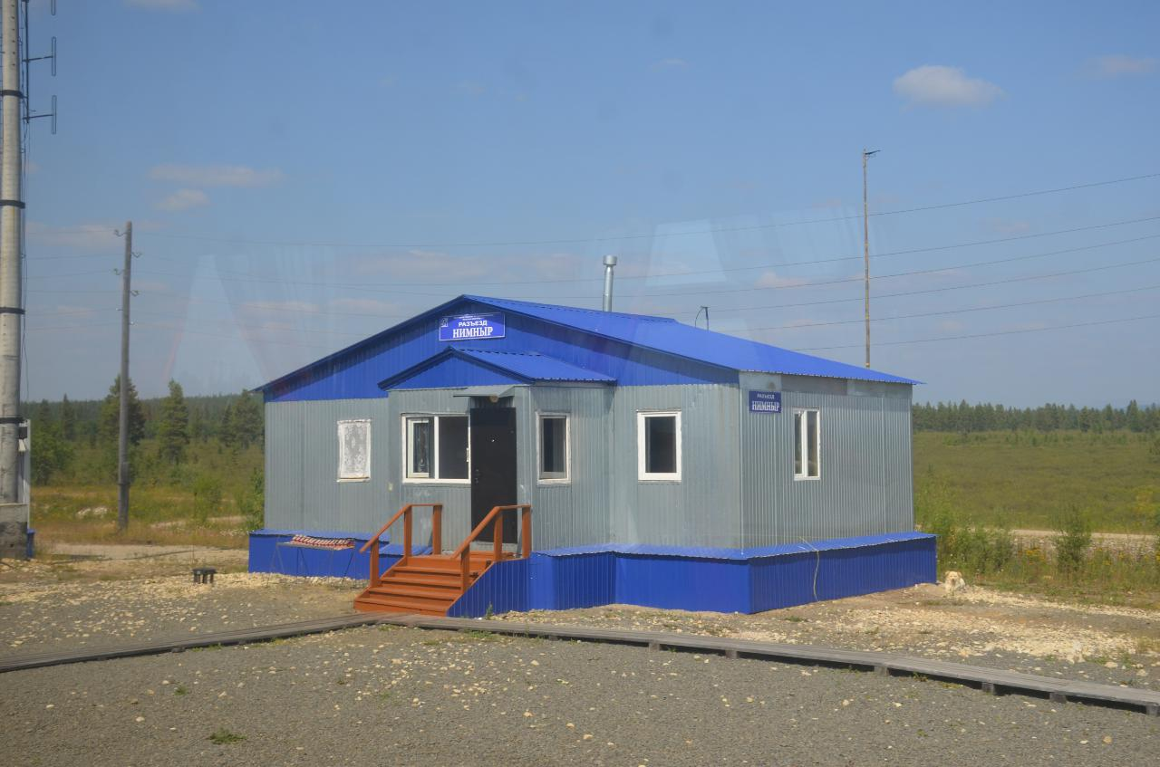 Поездка 5-6 августа 2019 г. по маршруту Якутск - Нерюнгри - Якутск во вновь назначенном поезде № 327 Нижний Бестях - Нерюнгри. Историческое событие - пуск пассажирского движения поездов из центральной Якутии, почти из Якутска.Железнодорожный разъезд Нимныр